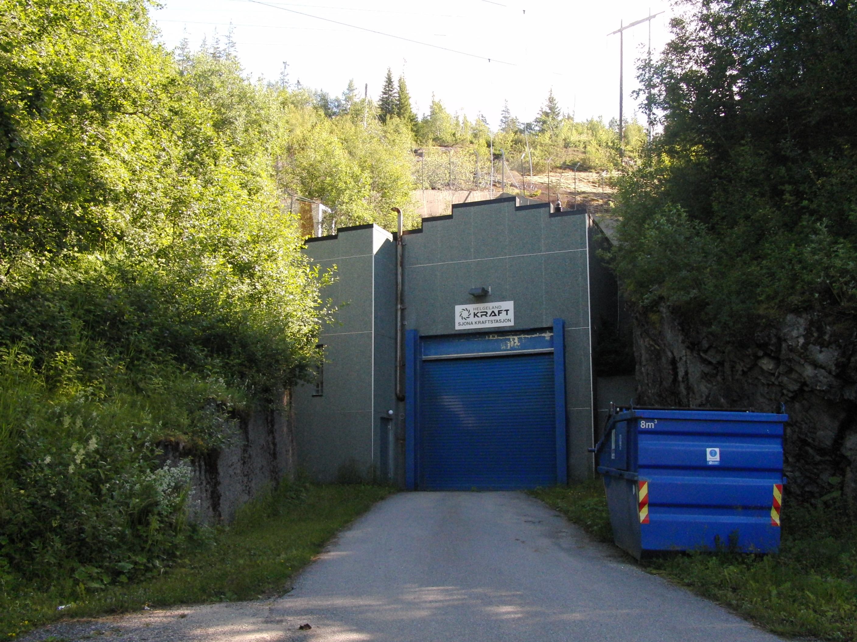 Sjona kraftverk